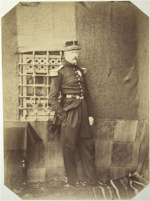 General de MacMahon en Crimée